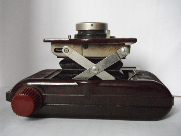 Фотоаппарат «Смена» довоенного выпуска (1939-1941)